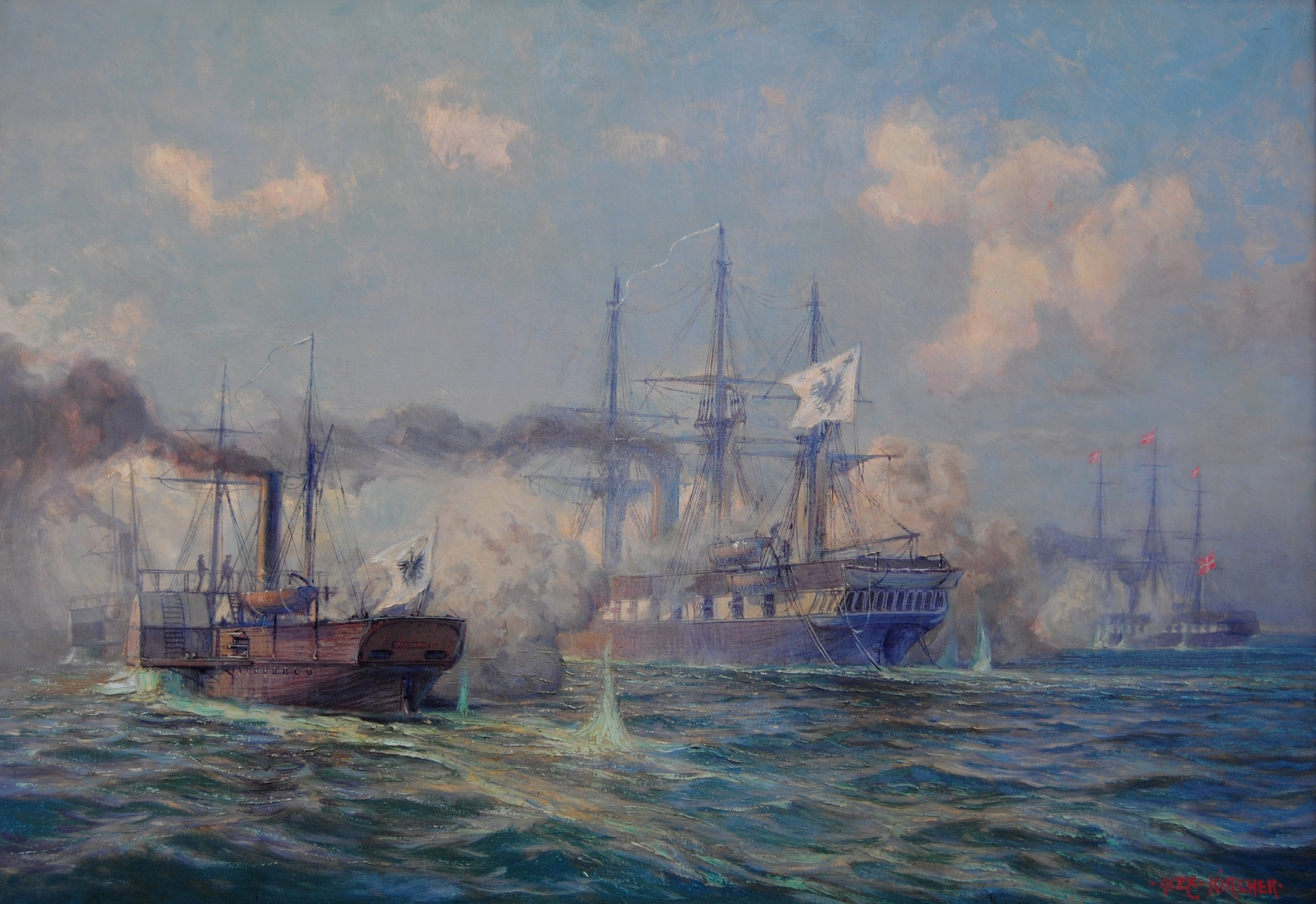 von links die preußischen Schiffe SMS Loreley und SMS Nymphe, dahinter die dänische Fregatte Sjaelland.